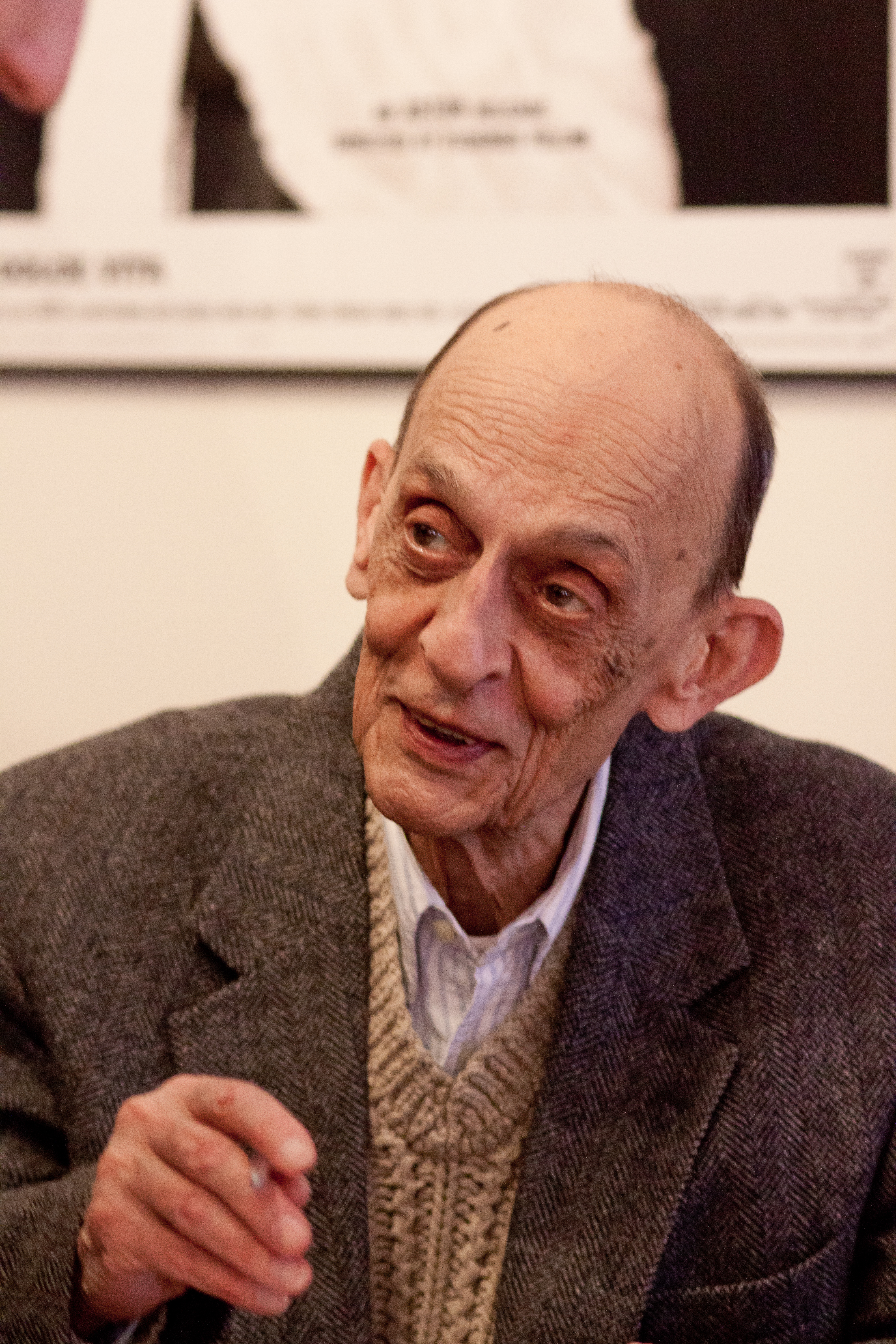 Переводчик Виктор Петрович Голышев